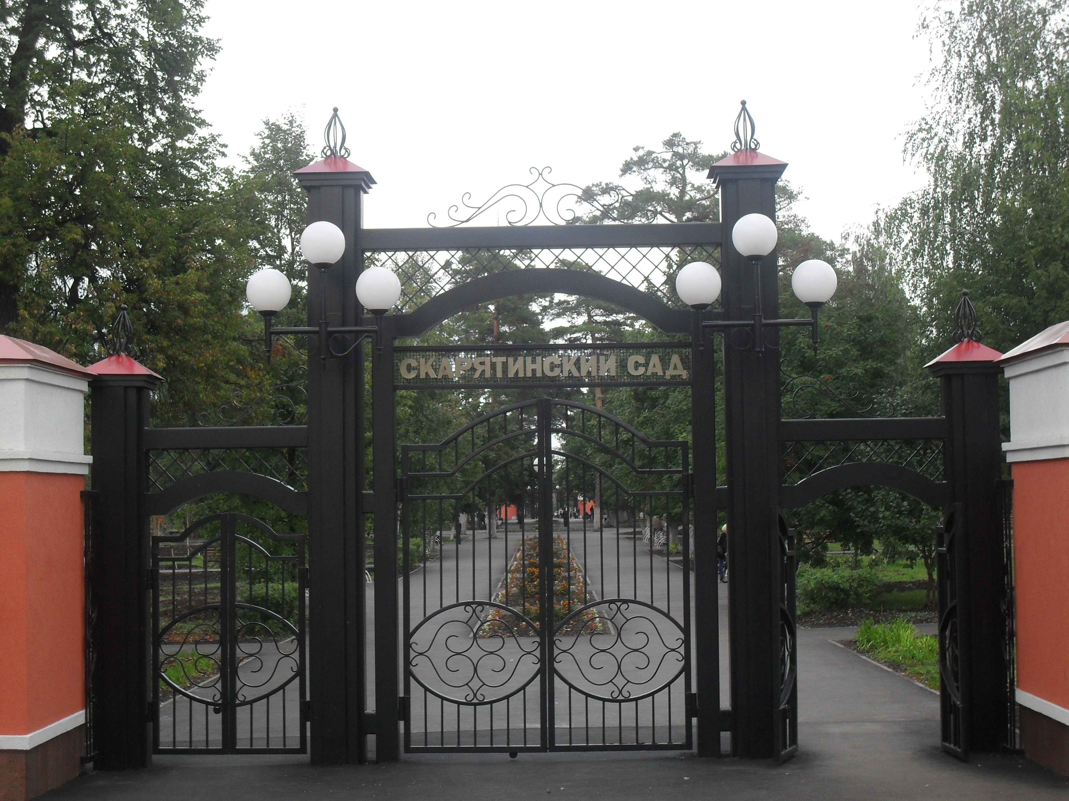 Центральный сад - парк г.Чистополя, расположен на улице К.Маркса